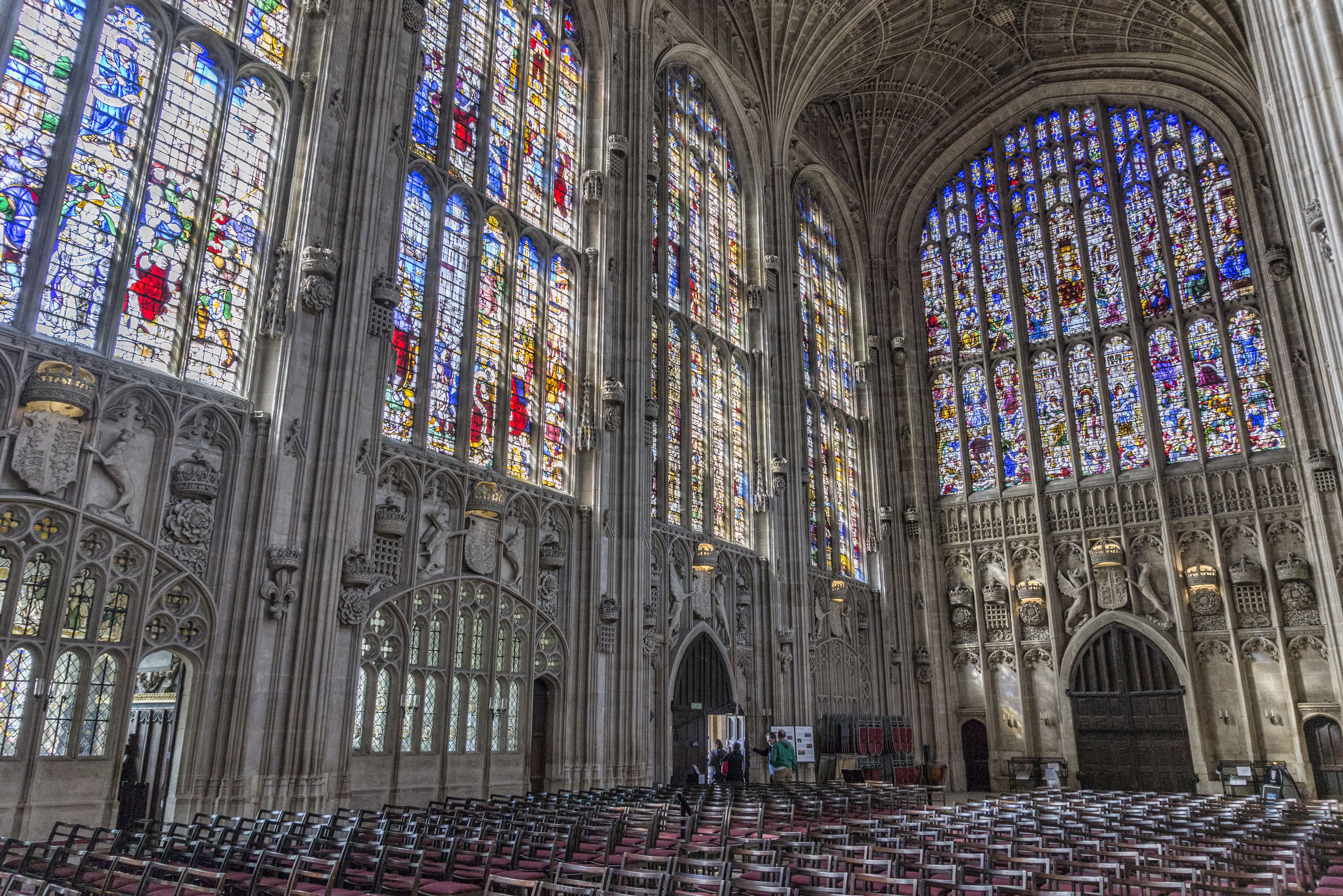 Intérieur de la King's College Chapel,vue sur les vitraux